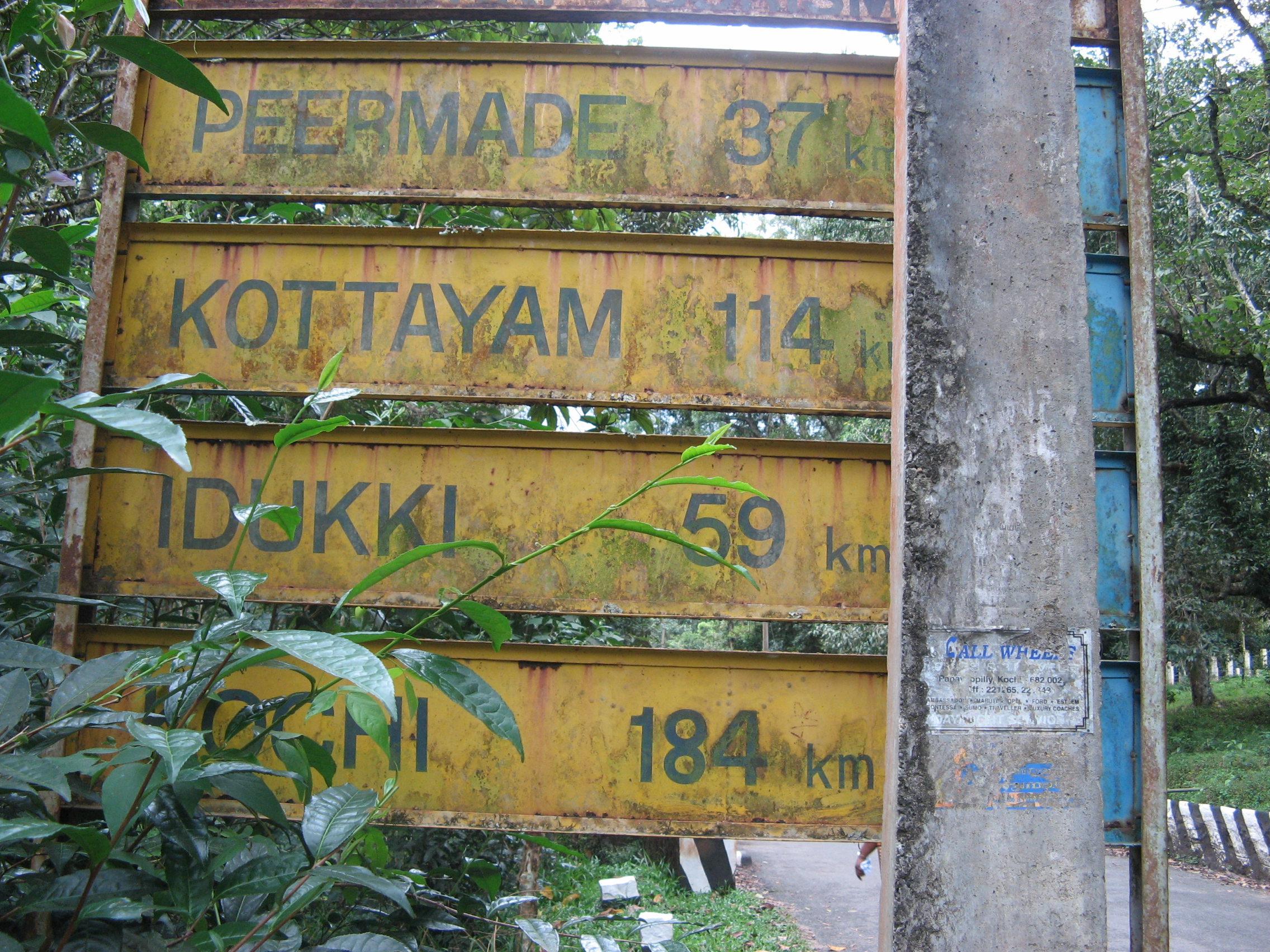 Distance Plate situated in Thekkady showing distance to various locations.